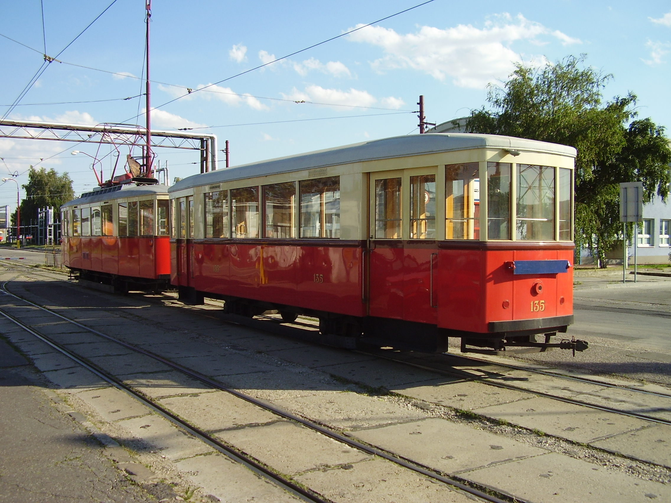 Bratislava